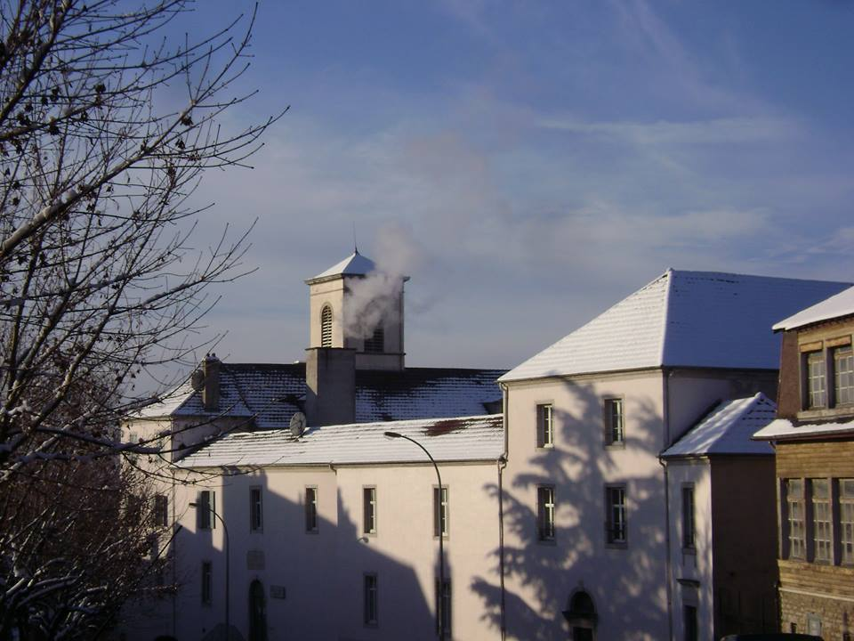 Le collège Gérôme de Vesoul sous la neige